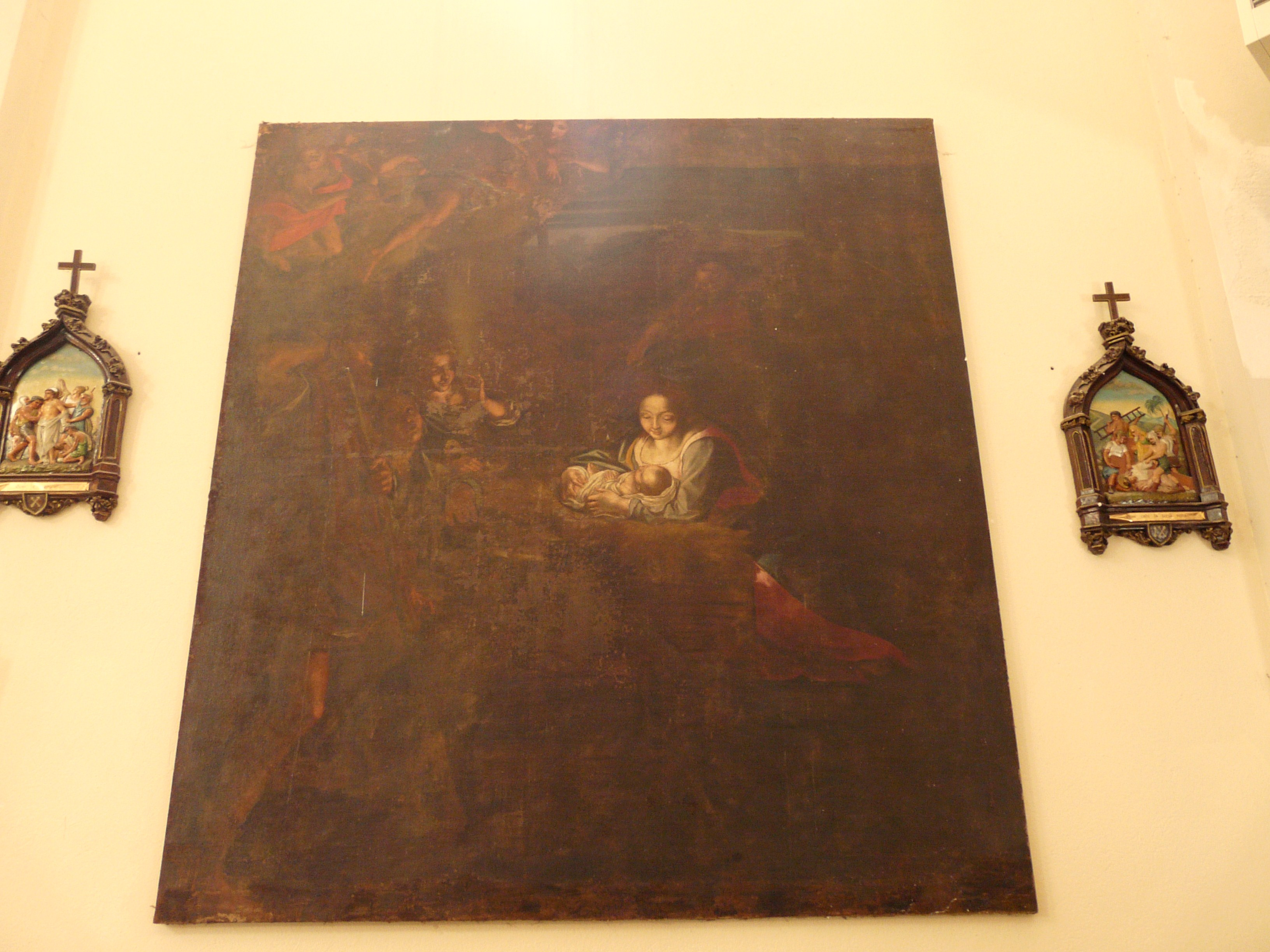 Chiesa-Santuario di San Remigio, Fosdinovo, Toscana, Italia